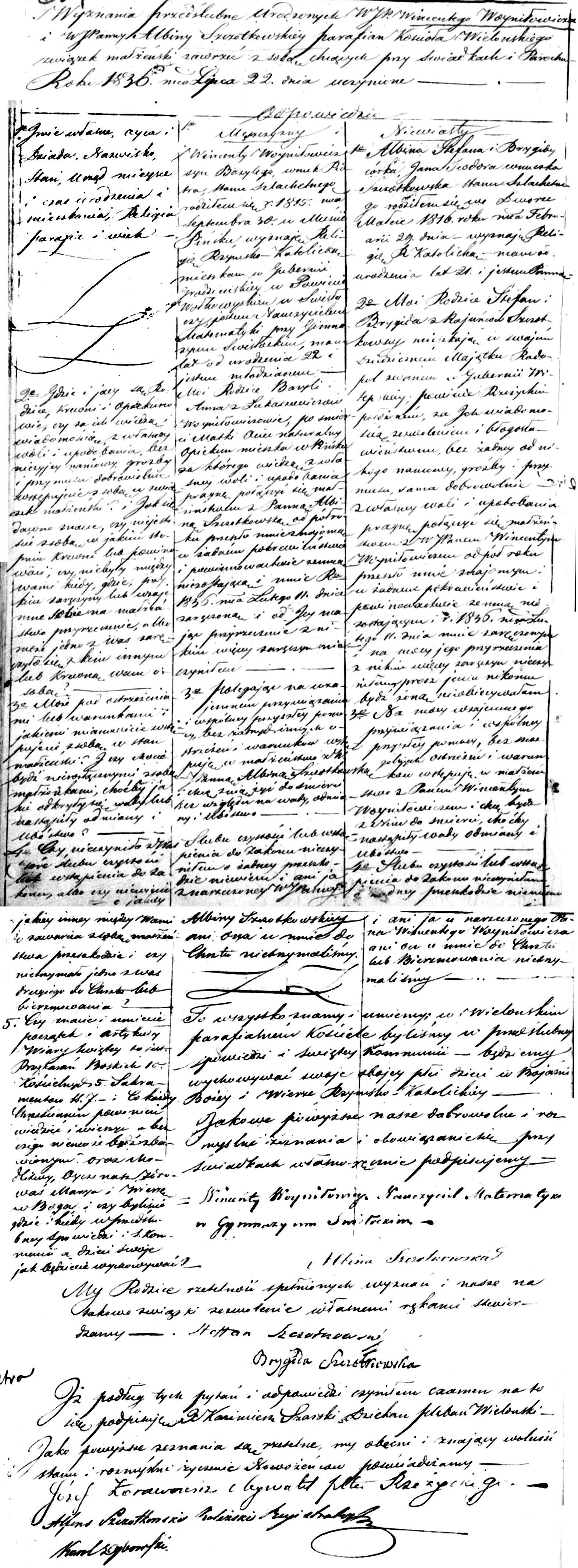 Wyznanie przedślubne sporządzone w w kościele w Wielonie (Łatgalia) przez Wincentego Woyniłowicza i pannę Albinę Szczotkowską